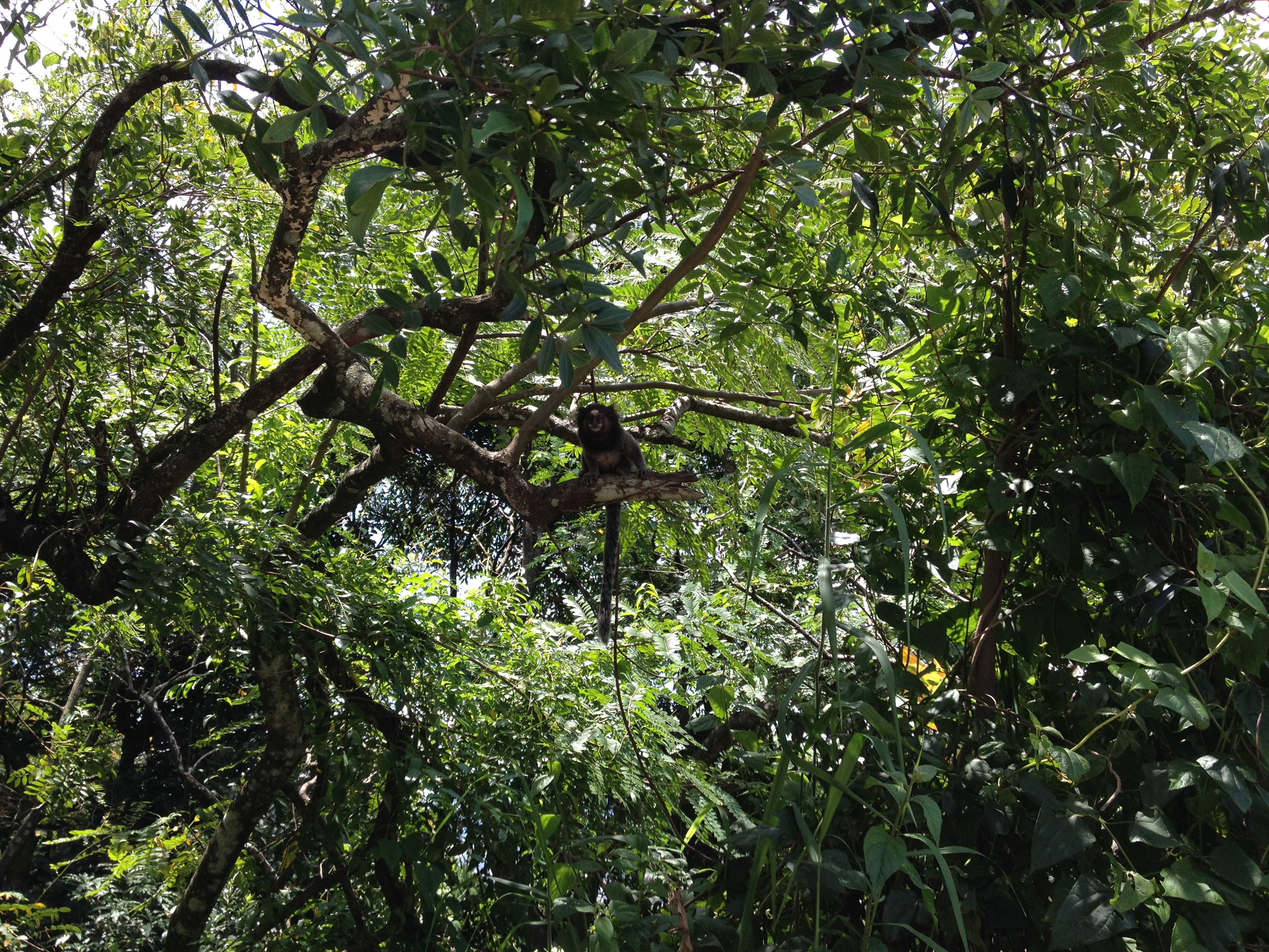 Callitrichinae (também chamada Hapalinae) é uma subfamília de Macacos do Novo Mundo, da família Cebidae. Popularmente, são conhecidos por sagui, soim ou sauim. O polegar da mão é curto e não oponível, e todos os dedos são providos de unhas em forma de garras. O primeiro dedo do pé é oponível aos demais e possui uma unha chata. Possuem dois dentes pré-molares e três molares. Todos são arbóreos. Alimentam-se de insetos, frutas, gomas e exsudatos, podendo também comer pequenos vertebrados, como lagartos, filhotes de pássaros e de ratos. Vivem tipicamente em pequenos grupos territoriais de aproximadamente 2 ou 8 animais. São o único grupo dos primatas que produzem regularmente gêmeos, que constituem mais de 80% dos nascimentos nas espécies que foram estudadas. Ao contrário de outros primatas, os machos fornecem geralmente tanto cuidado parental quanto as fêmeas — mais que elas em alguns casos. A estrutura social típica se constitui no casal reprodutor e sua prole. Na natureza normalmente dão à luz gêmeos, e já foi registrado em cativeiro o nascimento de trigémeos. As proles mais velhas ajudam nos cuidados com os filhotes, carregando e partilhando alimentos. São formados, em sua grande maioria, por grupos monogâmicos, apresentando apenas um casal dominante.